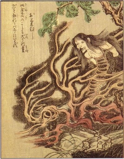 Okiku-mushi (於菊虫) from the Ehon Hyaku monogatari (絵本百物語)